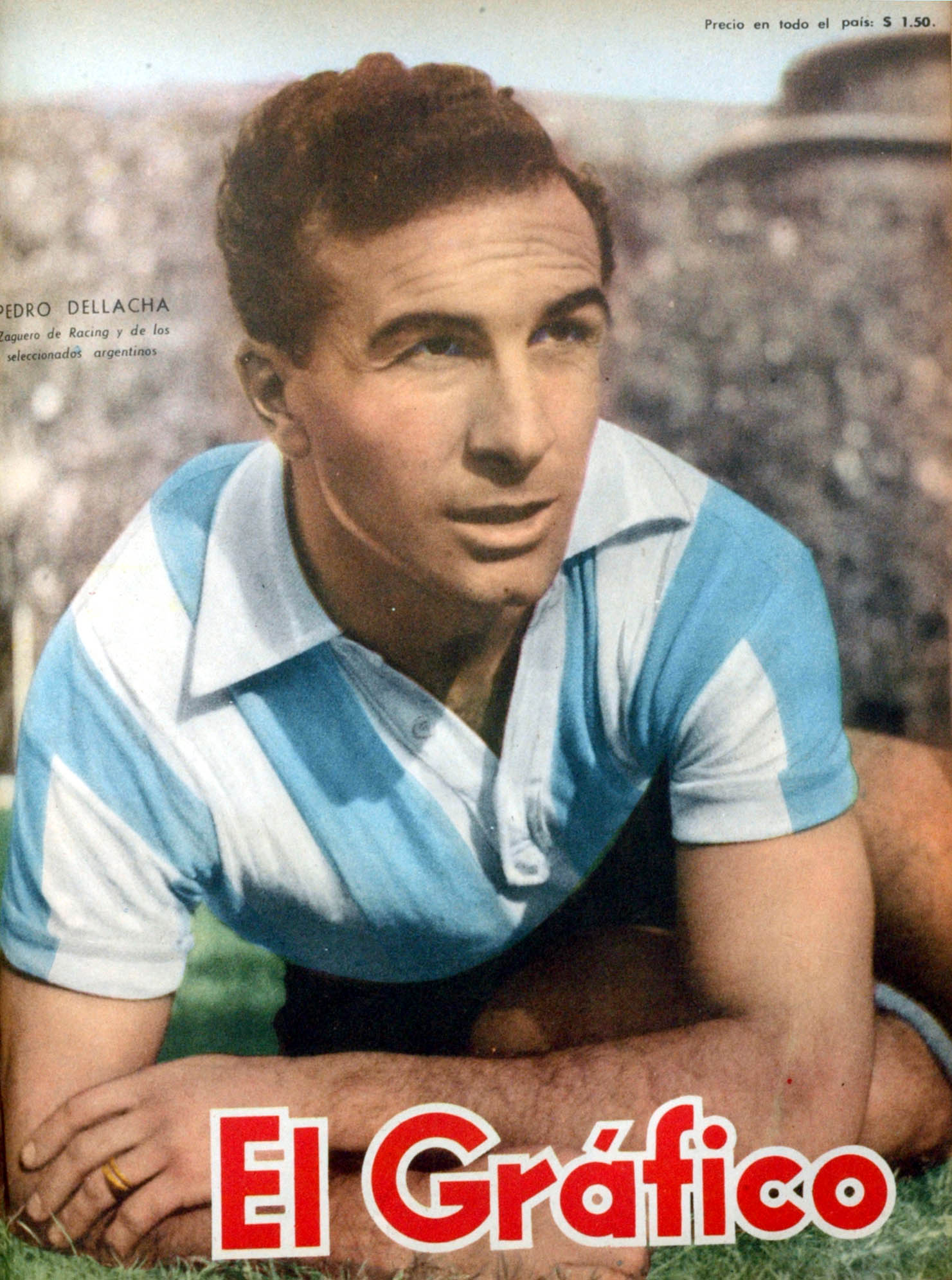 El Grafico del 28 de Octubre de 1955. Edicion 1888